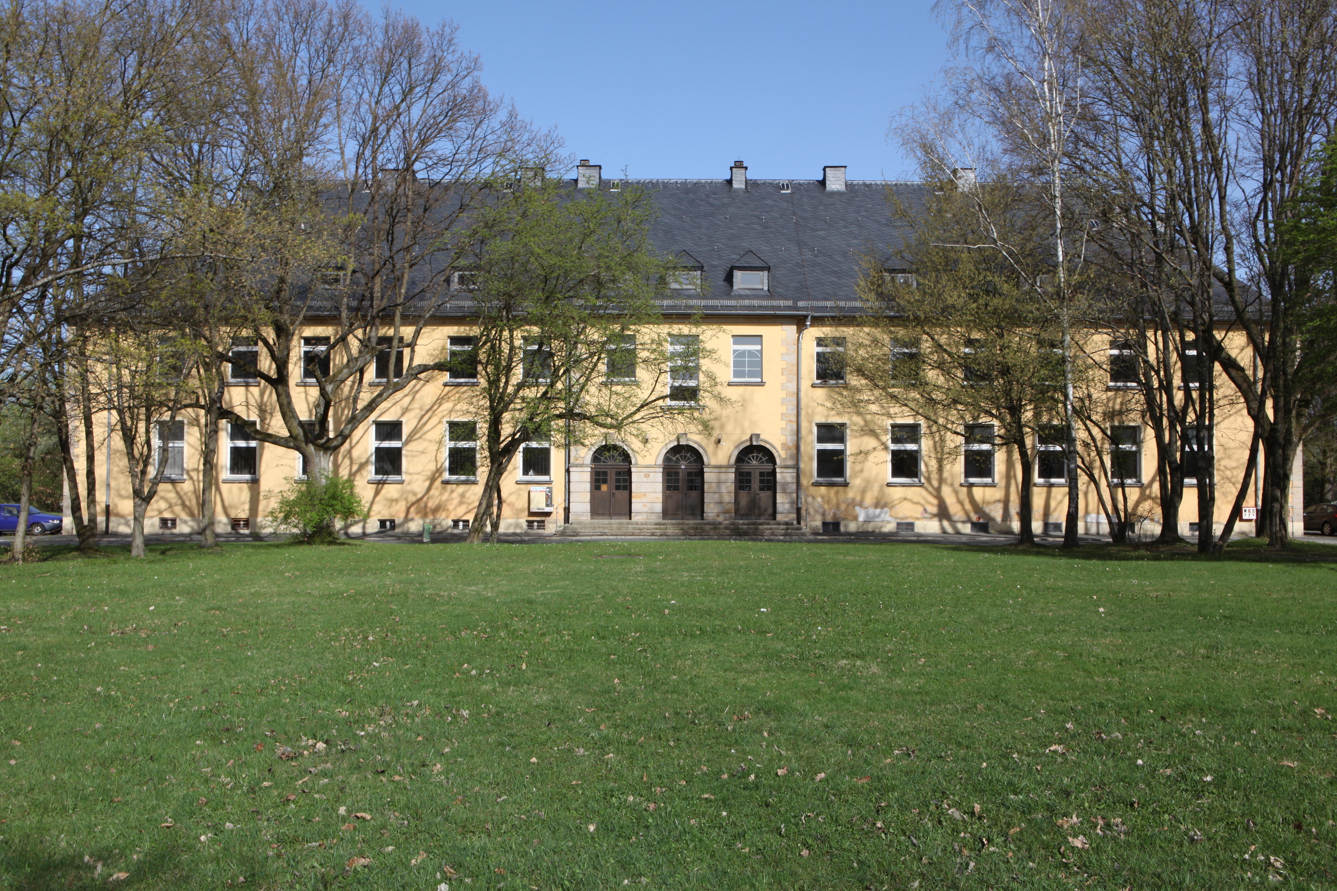 ehem. Stabsgebäude Passchendaele-Kaserne Dörfles-Esbach, Landkreis Coburg (Passchendaele-Kaserne)